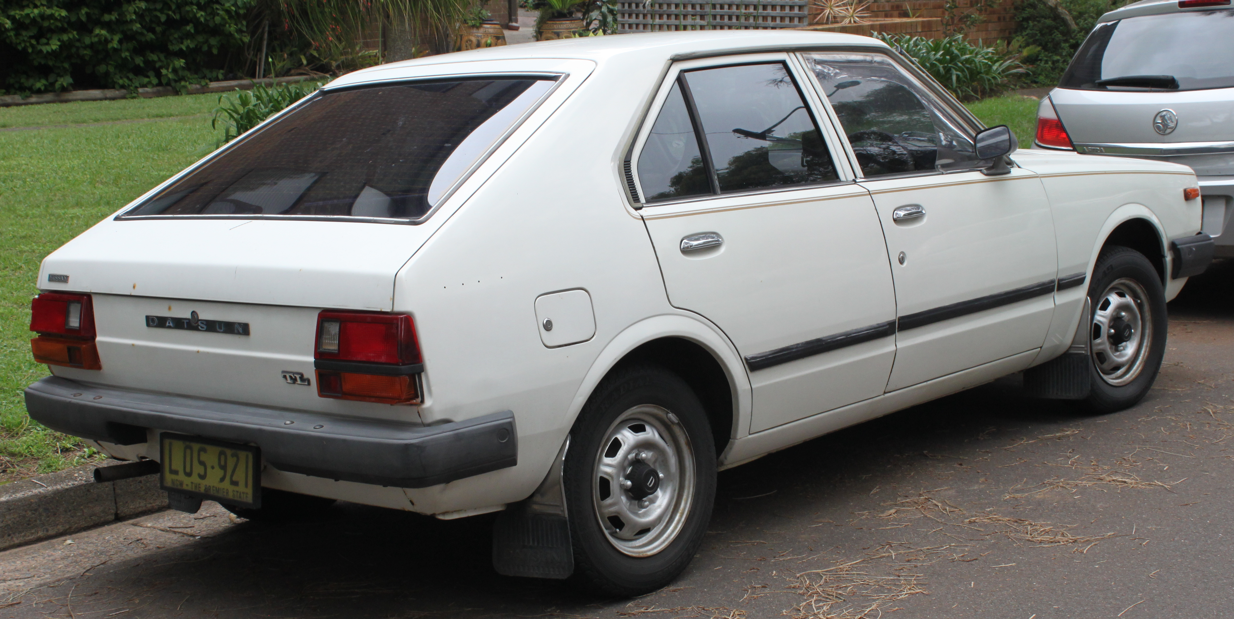 Datsun Pulsar N10 TL